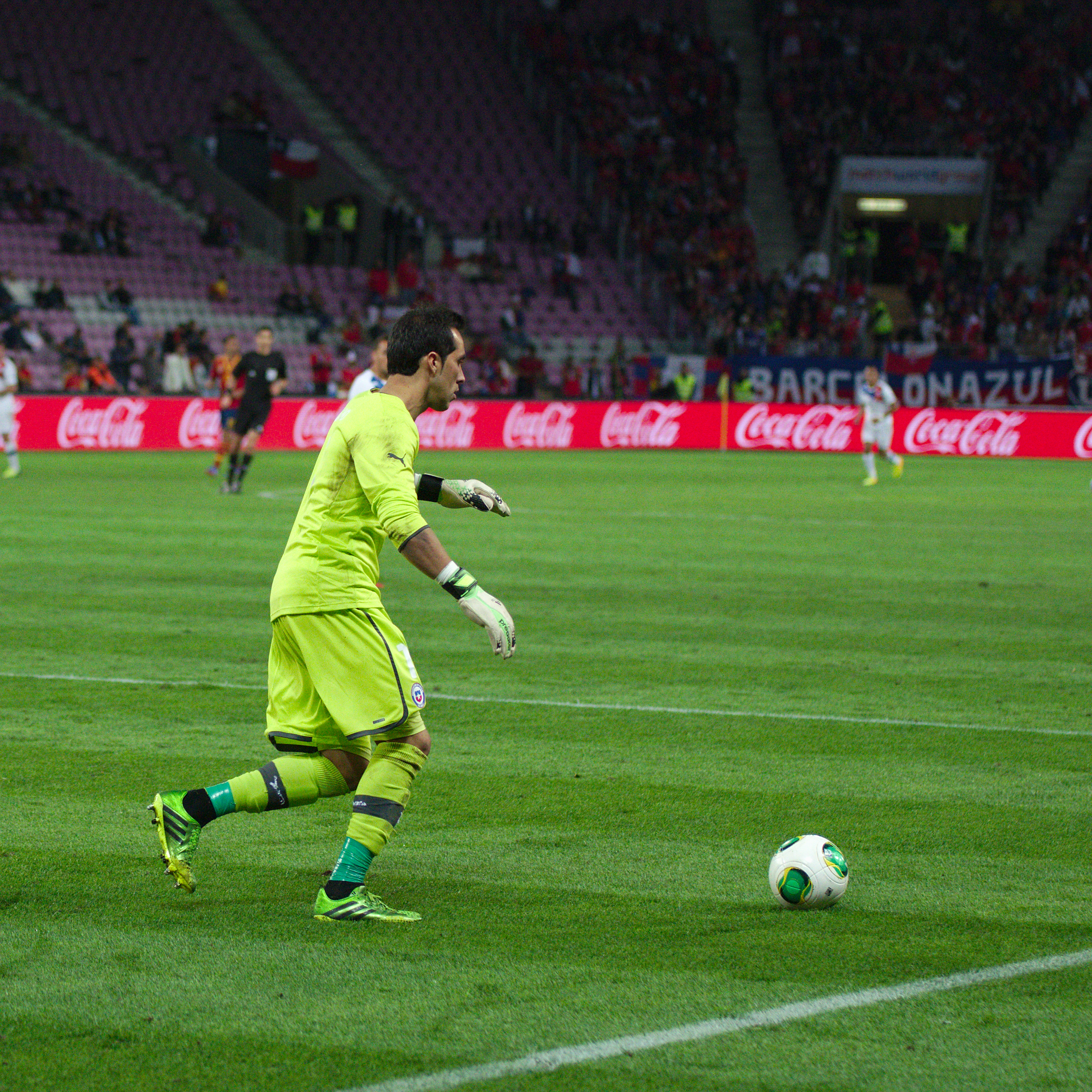 Spain - Chile - 10-09-2013 - Geneva - Claudio Bravo